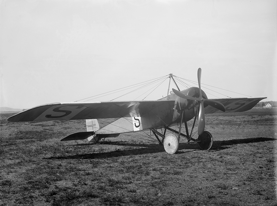 Flygplan Thulin D uppställt i Ljungbyhed.